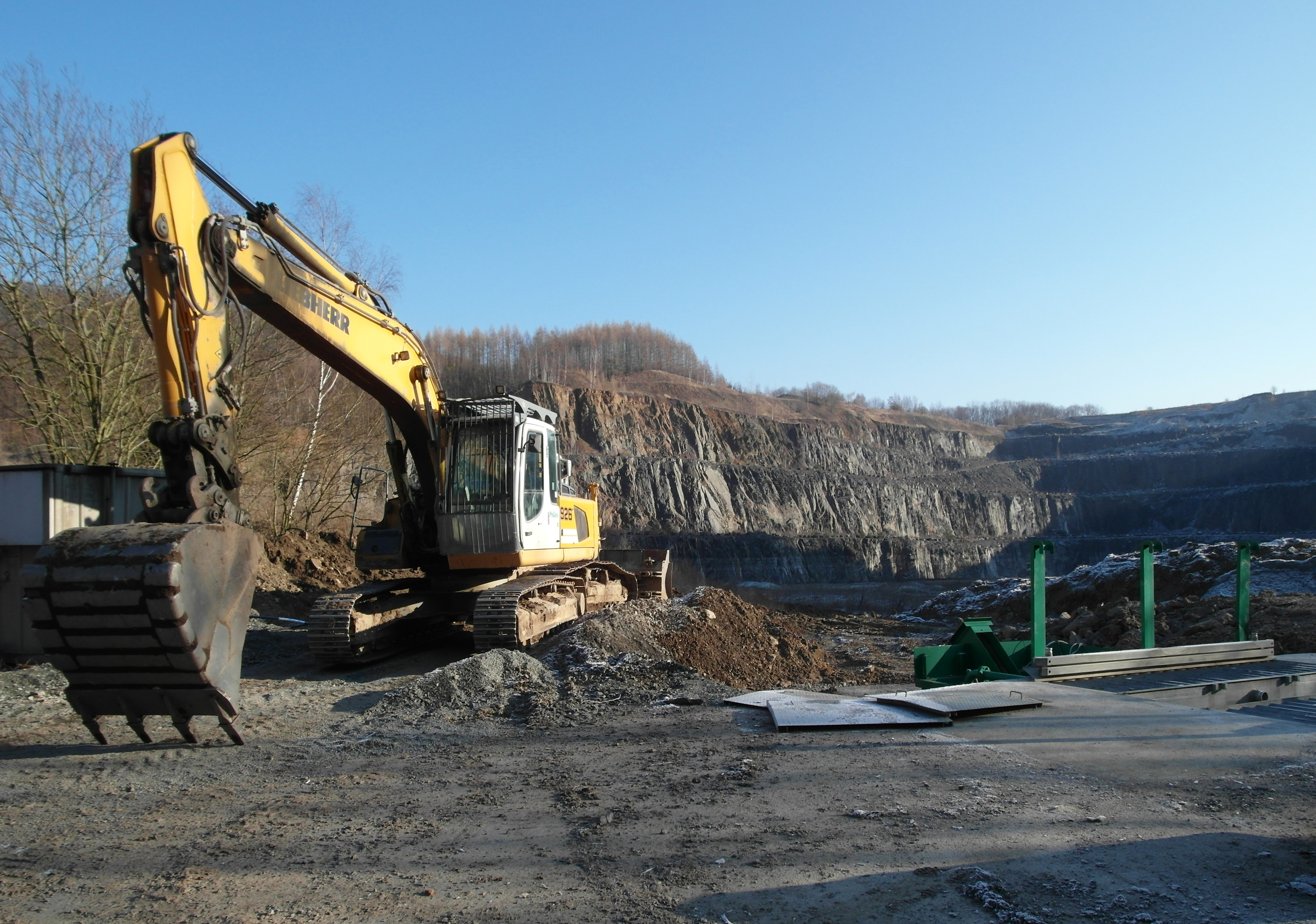 22.01.2019 01819 Nentmannsdorf (Bahretal): Hornblendebruch Nentmannsdorf (GMP: 50.914179,13.882700). Hier baut die Sächsische Baufstoffunion (SBU) im ausgedehnten Steinbruch vom Hartsteinwerk Nentmannsdorf Amphibolit ab. Sicht nach Südosten. [SAM9093.JPG]20190122100DR.JPG(c)Blobelt